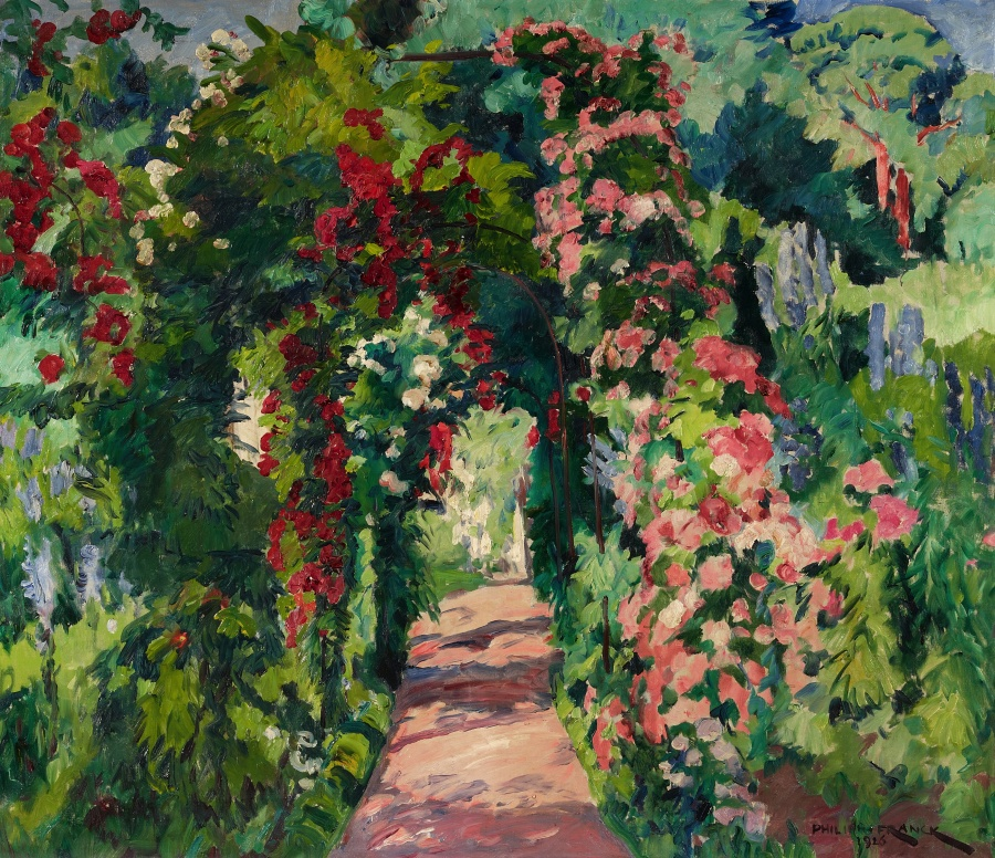 Wannseegarten